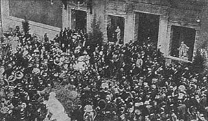 INAUGURACIÓN DEL PALACIO DE BELLAS ARTES el 21 de septiembre de 1910 con la gran Exposición Internacional. Asistentes a las inauguración